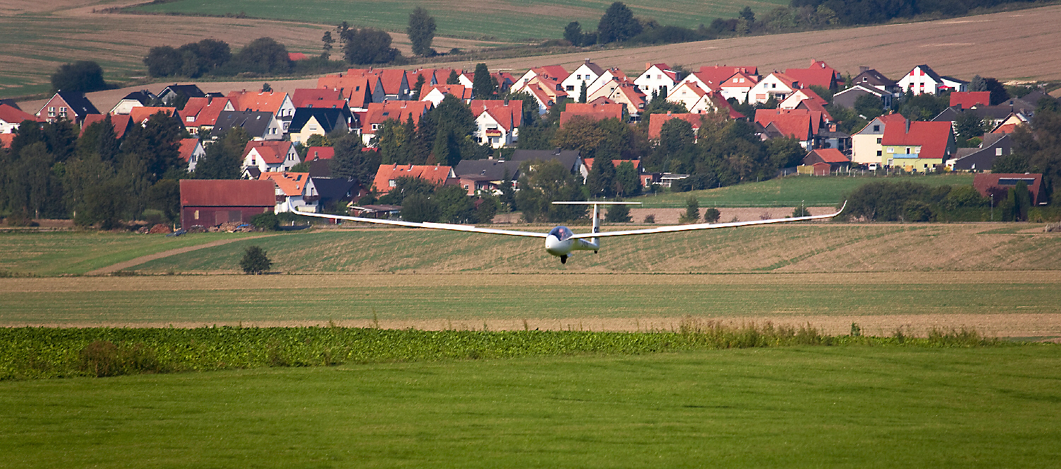 Blick vom Selgelflugplatz über Bisperode